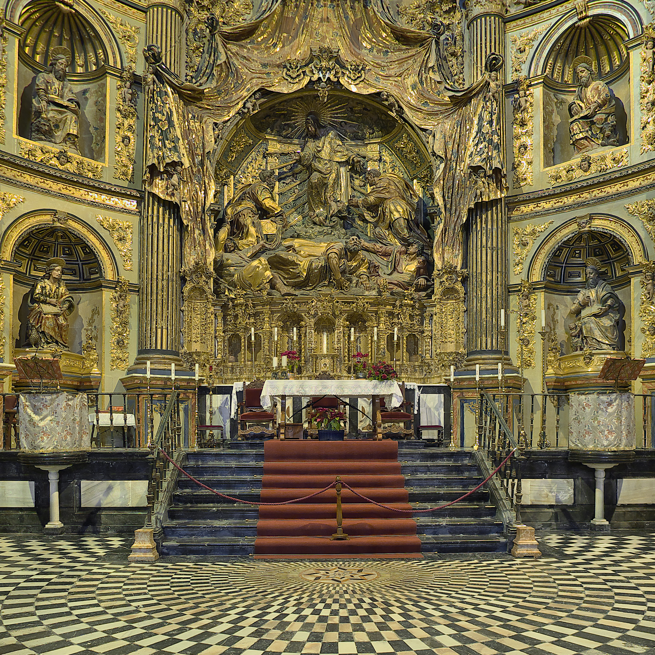 Alonso de Berruguete recibe el encargo de desarrollar en el altar mayor, el programa central de la capilla, la Transfiguración de Jesús (1559). Esta capilla funeraria sufrió importantes daños durante los acontecimientos del 1936, perdiéndose las figuras que acompañan al Señor e importantes piezas de los retablos.